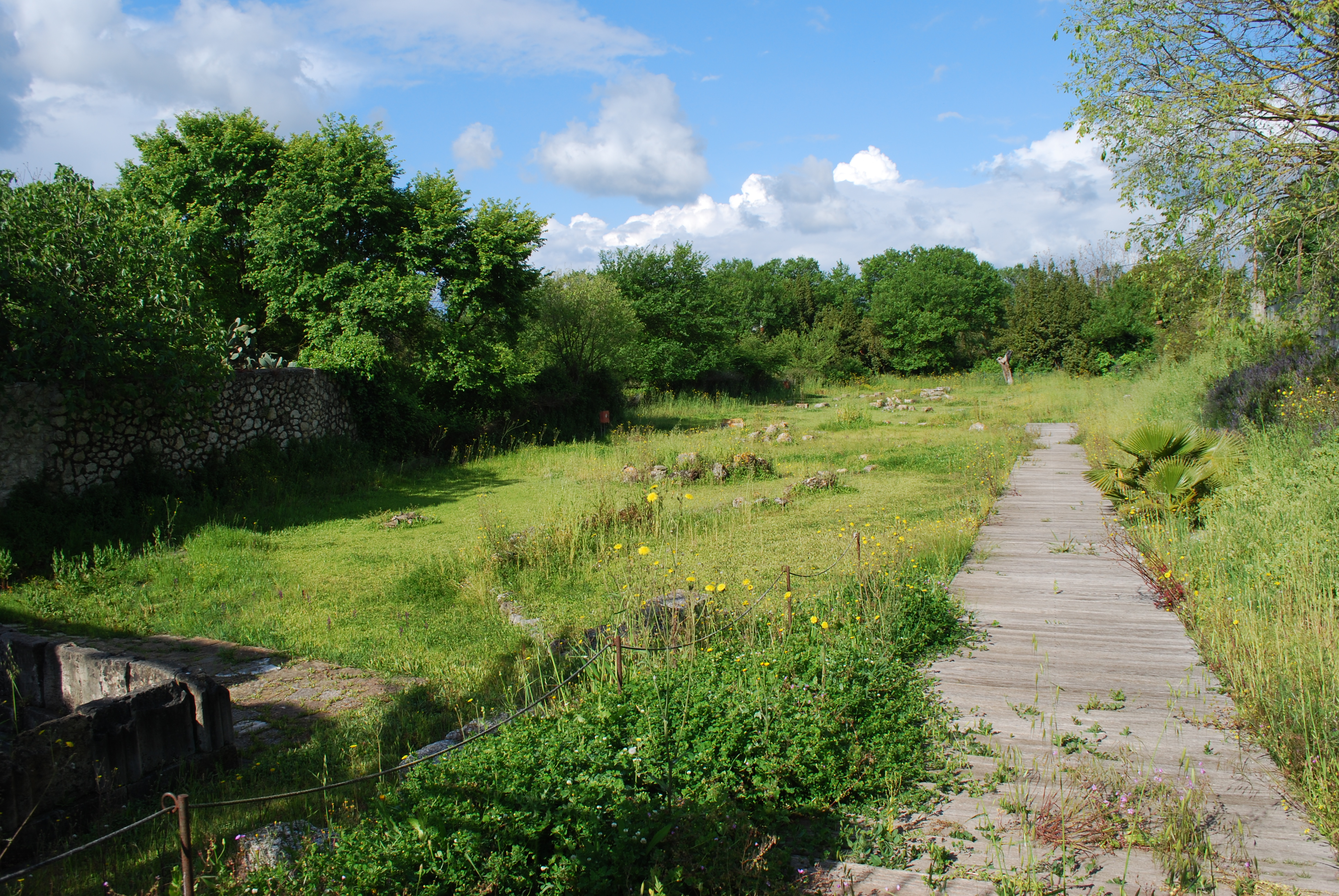 Vue de Corfou.